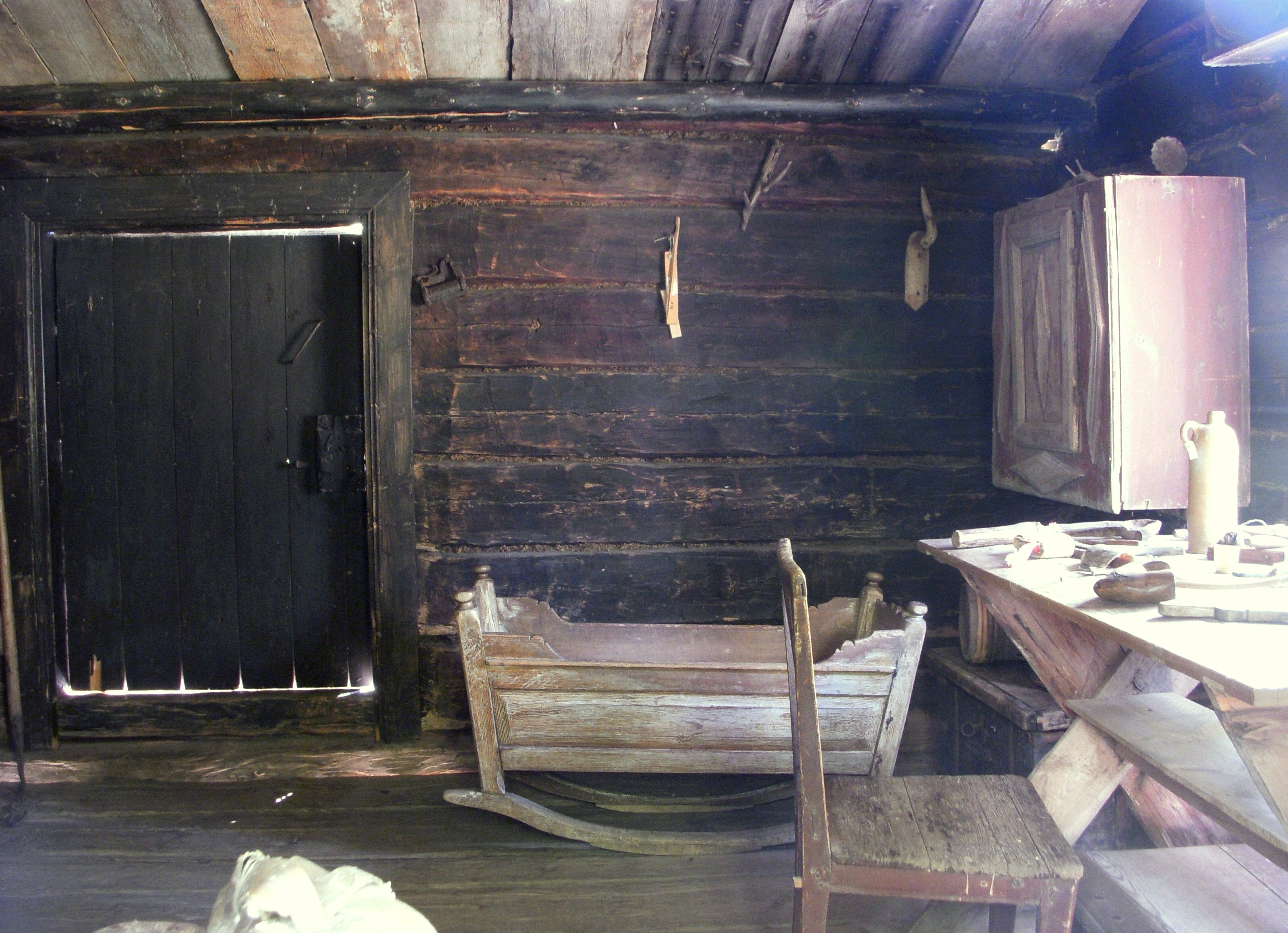 Finngammelgården vid Skattlösberg i Dalarna, "Pörtet" inredning